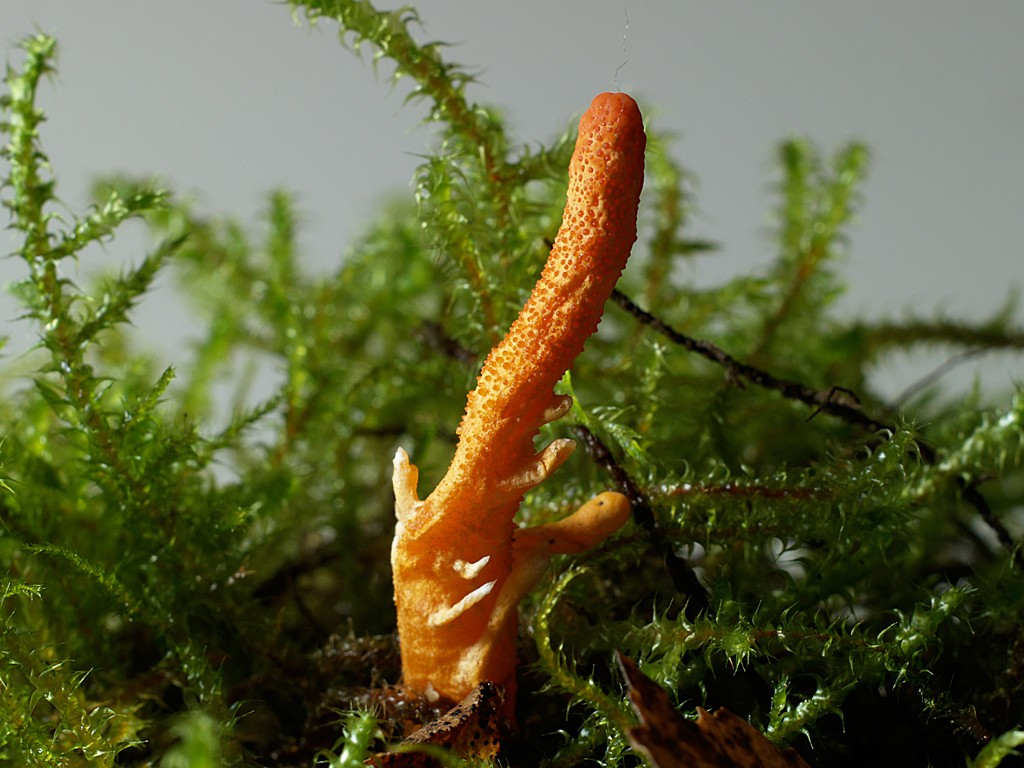 Puppenkernkeule Cordyceps militaris Bild zur Verfügung gestellt von E. Langer, Deutsche Gesellschaft für Mykologie mit E-Mail vom 20.02.2009